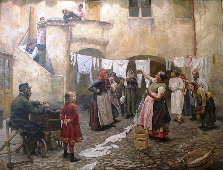 obraz od Vojtěcha Bartoňka s názvem Spor